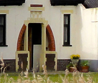 De Blokken, monumentale villaboerderij nabij Baflo (detail de ingang in het halsgedeelte)